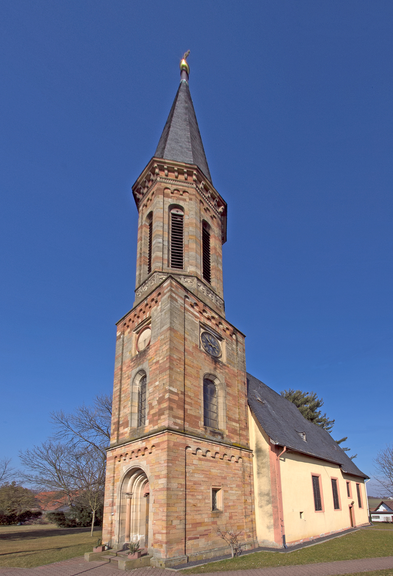 Kirche in Effolderbach (Ortenberg) im Wetteraukreis in Deutschland